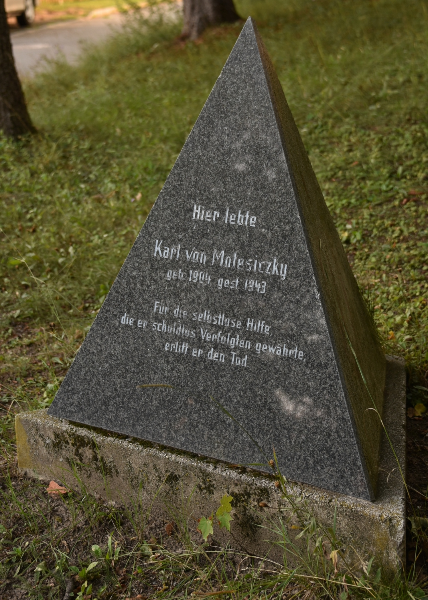 Pyramide Karl von Motesiczky, Hinterbrühl